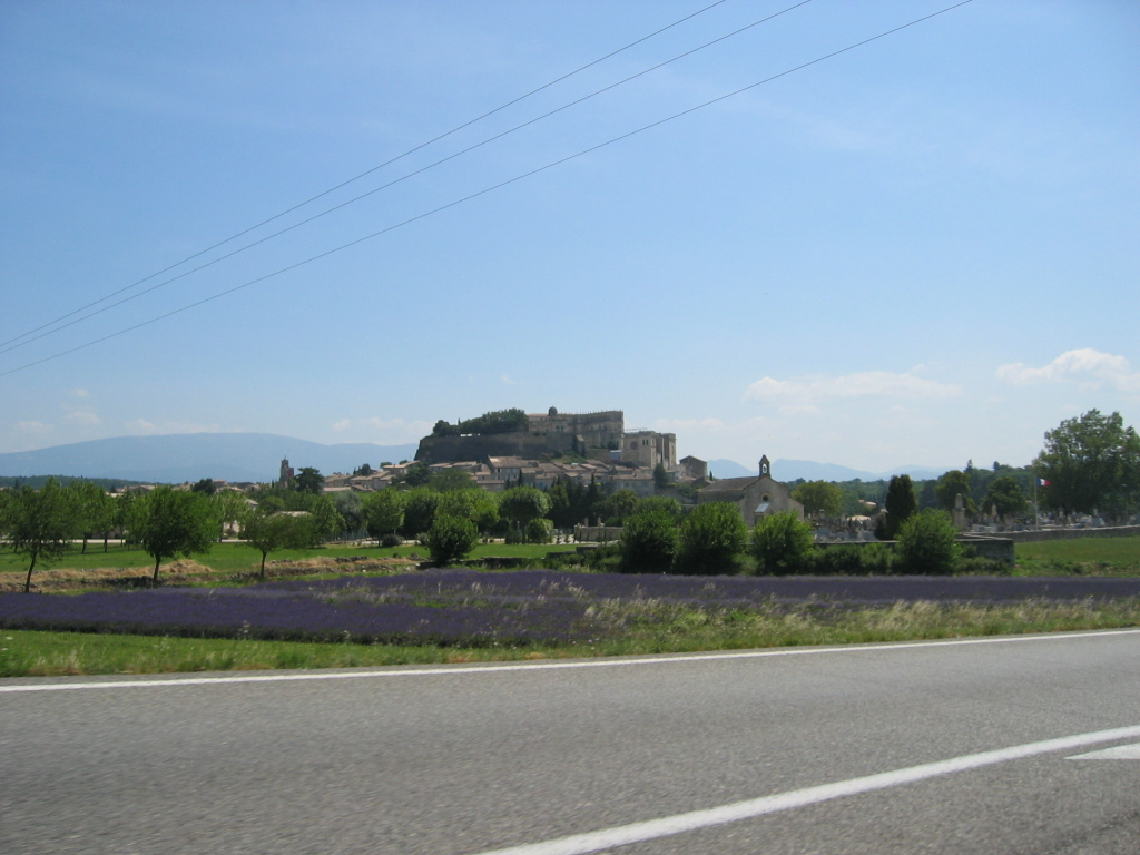 Chateau de Grignan - Drome provençale - France